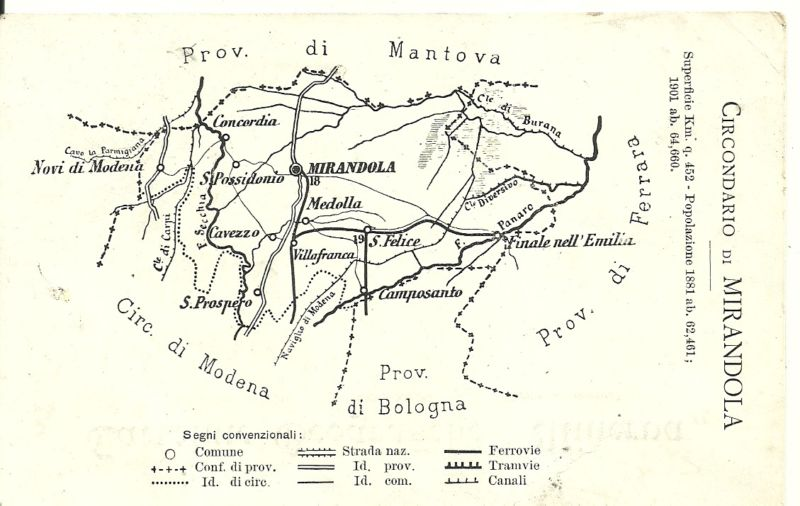 Mappa del Circondario di Mirandola nel 1901. La linea ferroviaria tra San Felice sul Panaro e Mirandola non è ancora attiva (aperta nel 1902)